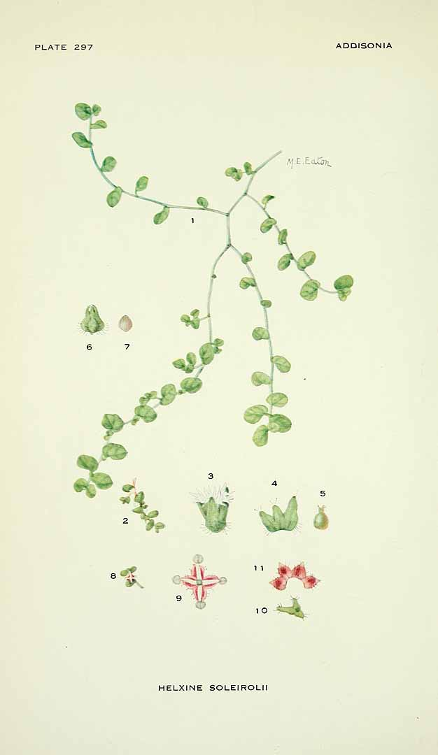 Ілюстрація Soleirolia soleirolii